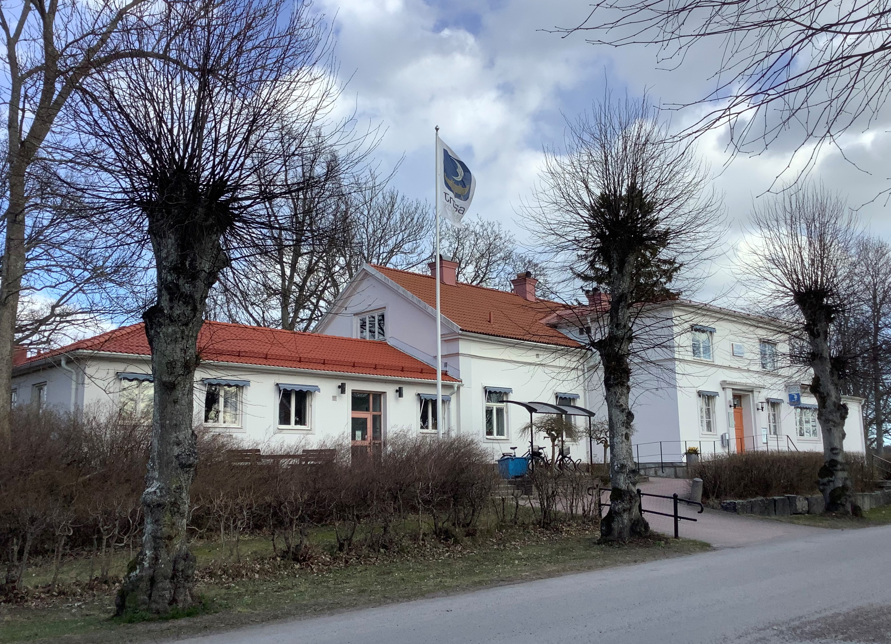 "Vita kommunhuset" i Trosa, 4 april 2020.